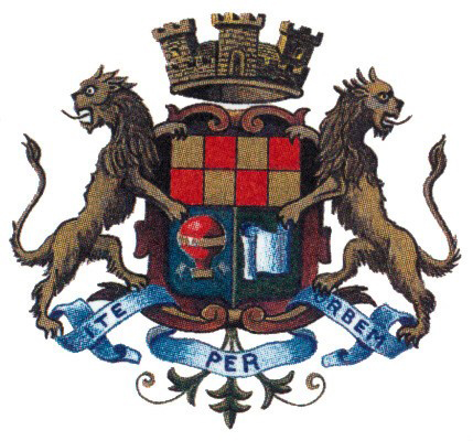 Les armoiries des papeteries Montgolfier lorsqu'elles deviennent Manufactures Royales en 1784